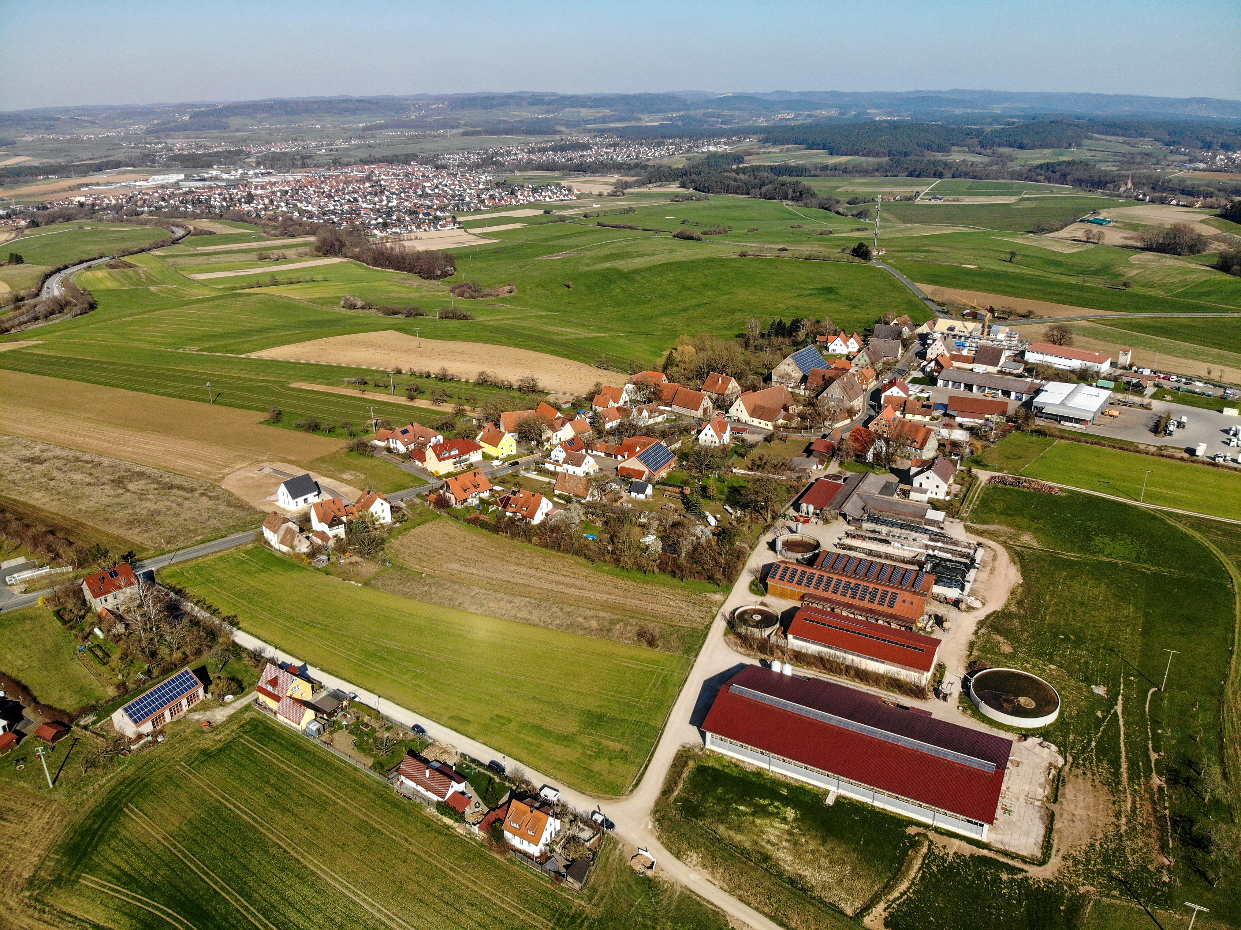 Kleingeschaidt Luftaufnahme (2020)